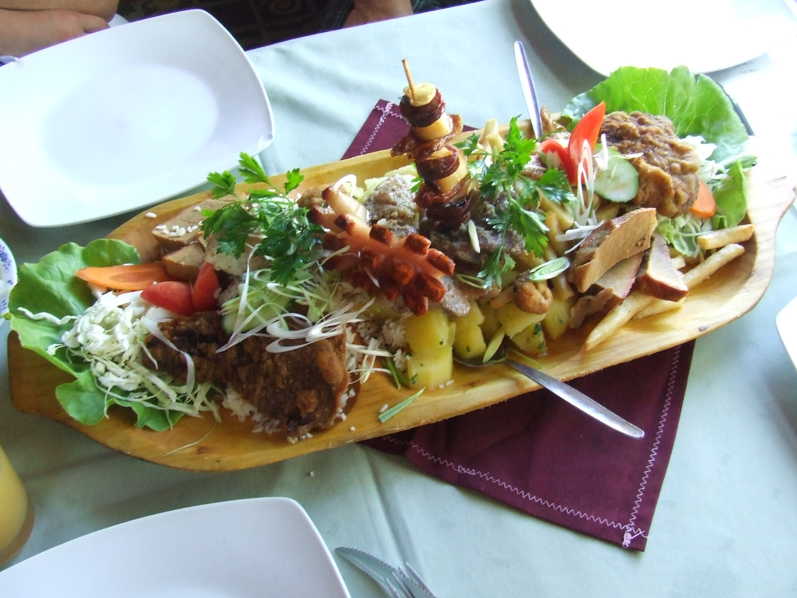 fatányéros, Alsópetény, Hármaskönyv fogadó